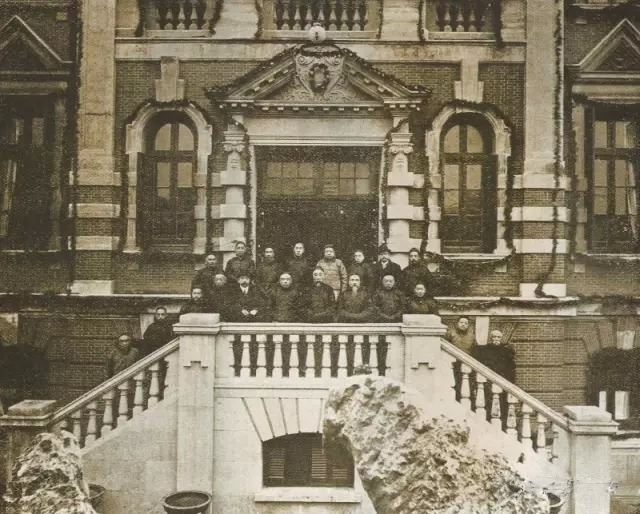 中文（香港）: 上海总商会议事厅大楼落成（1916年）